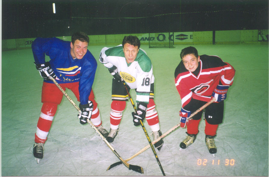 Wiesław Jobczyk z synami. Od lewej Tomasz,Wiesław i Michael Jobczyk